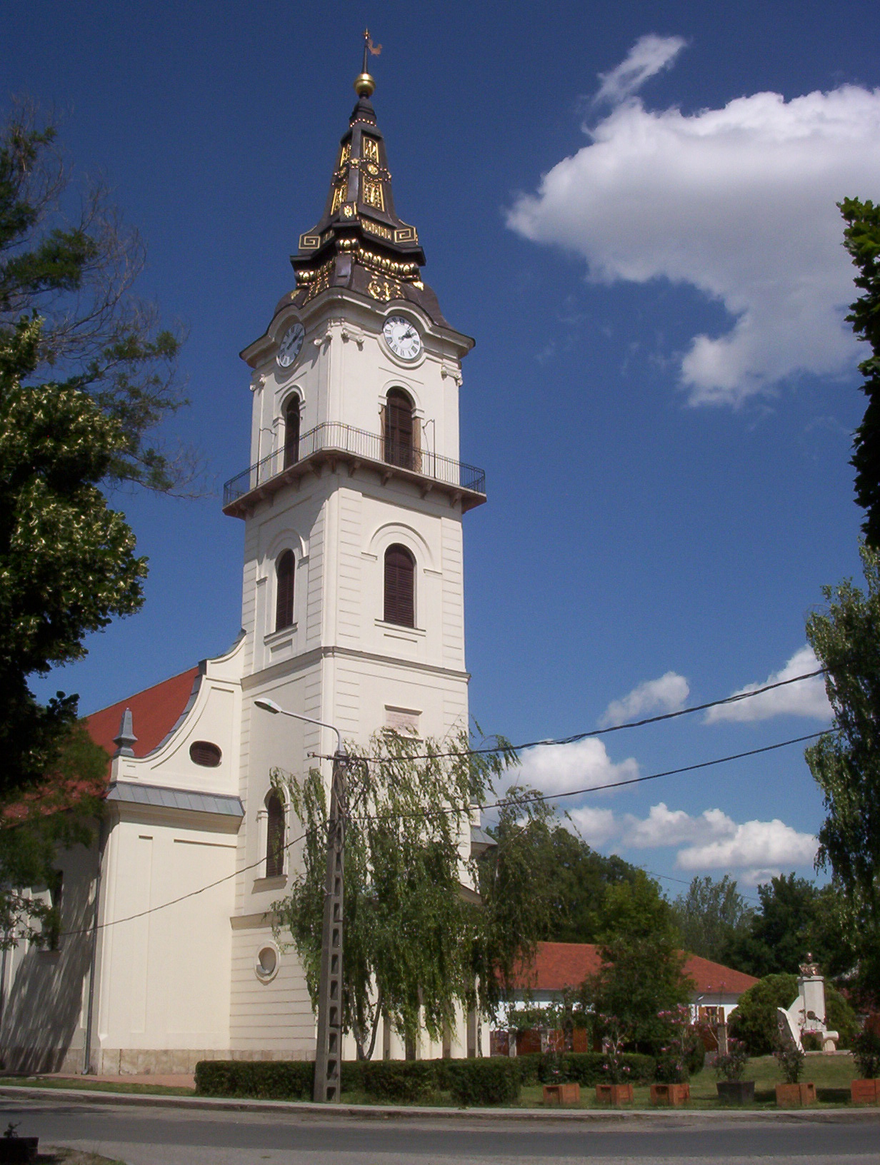 Kunszentmiklós, Református Templom